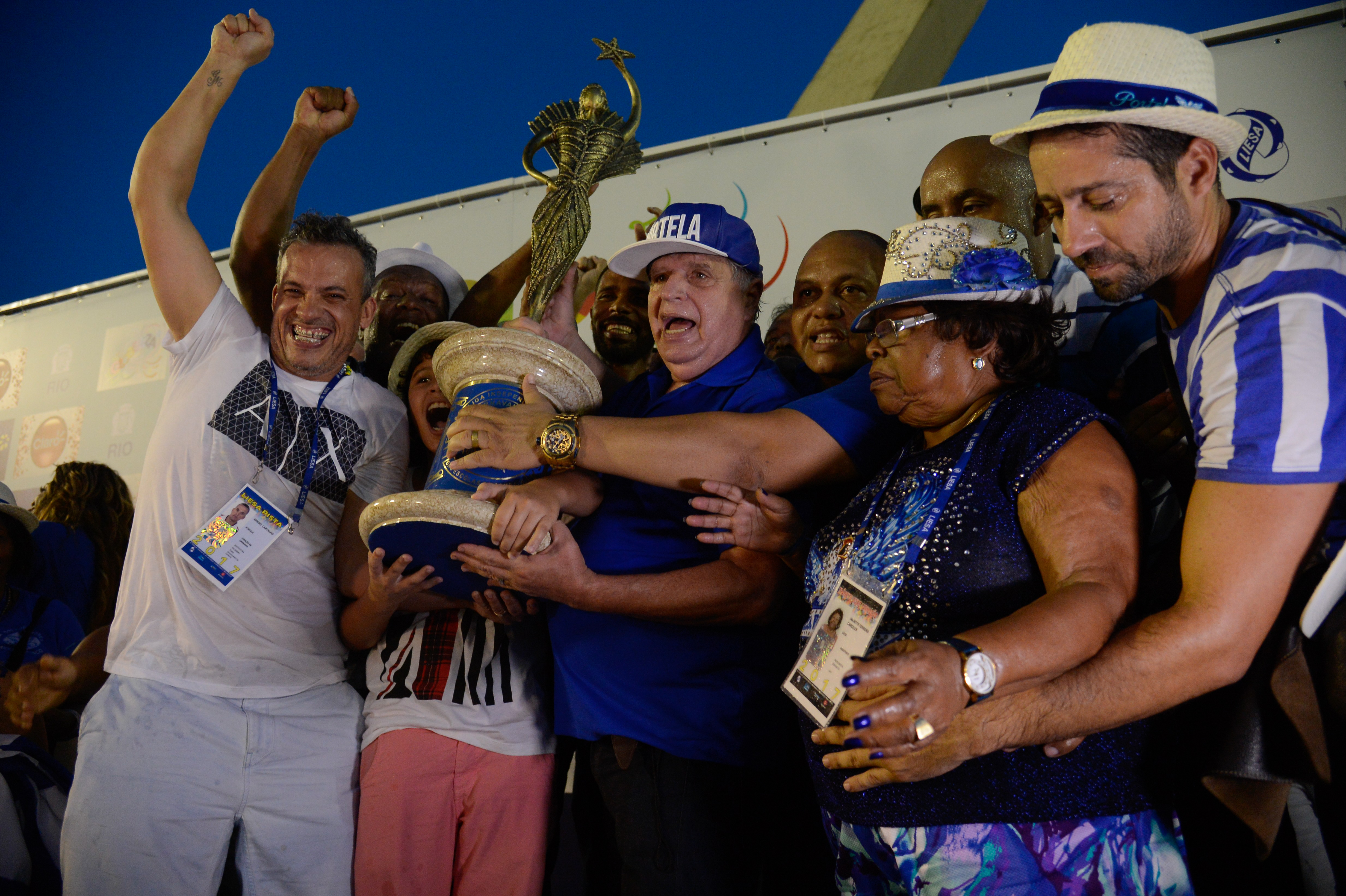 Rio de Janeiro - A escola de samba Portela é a campeã do desfile das escolas do Grupo Especial no Sambódromo (Fernando Frazão/Agência Brasil)